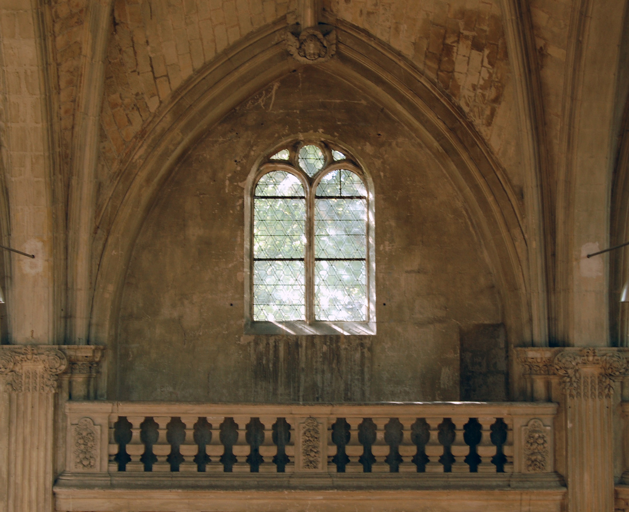 Fenêtre du mur sur de la chapelle Saint-Louis du collège Henri-IV de Poitiers